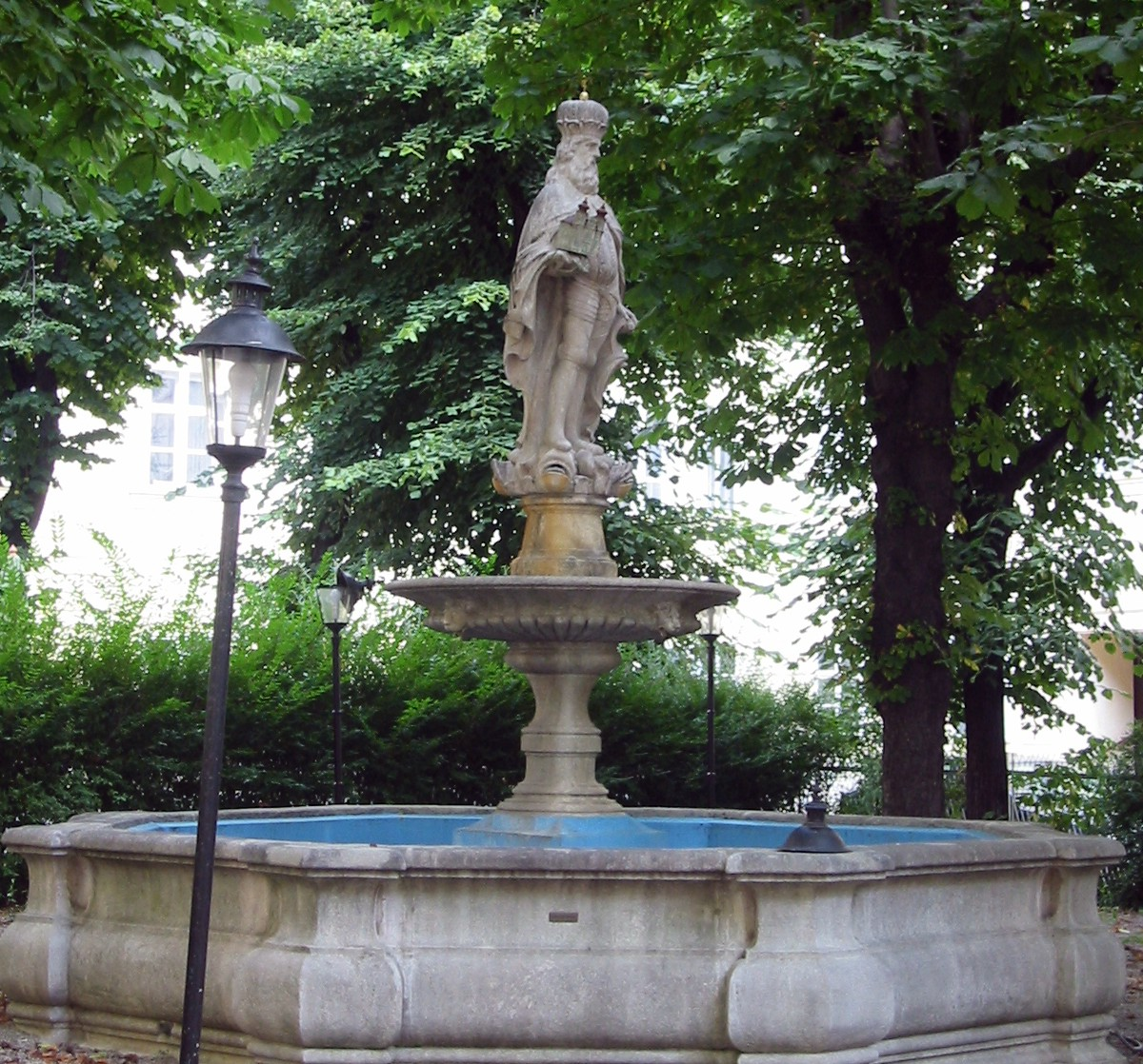 Wien, Heinrich-Jasomirgott-Brunnen im Schottenstift